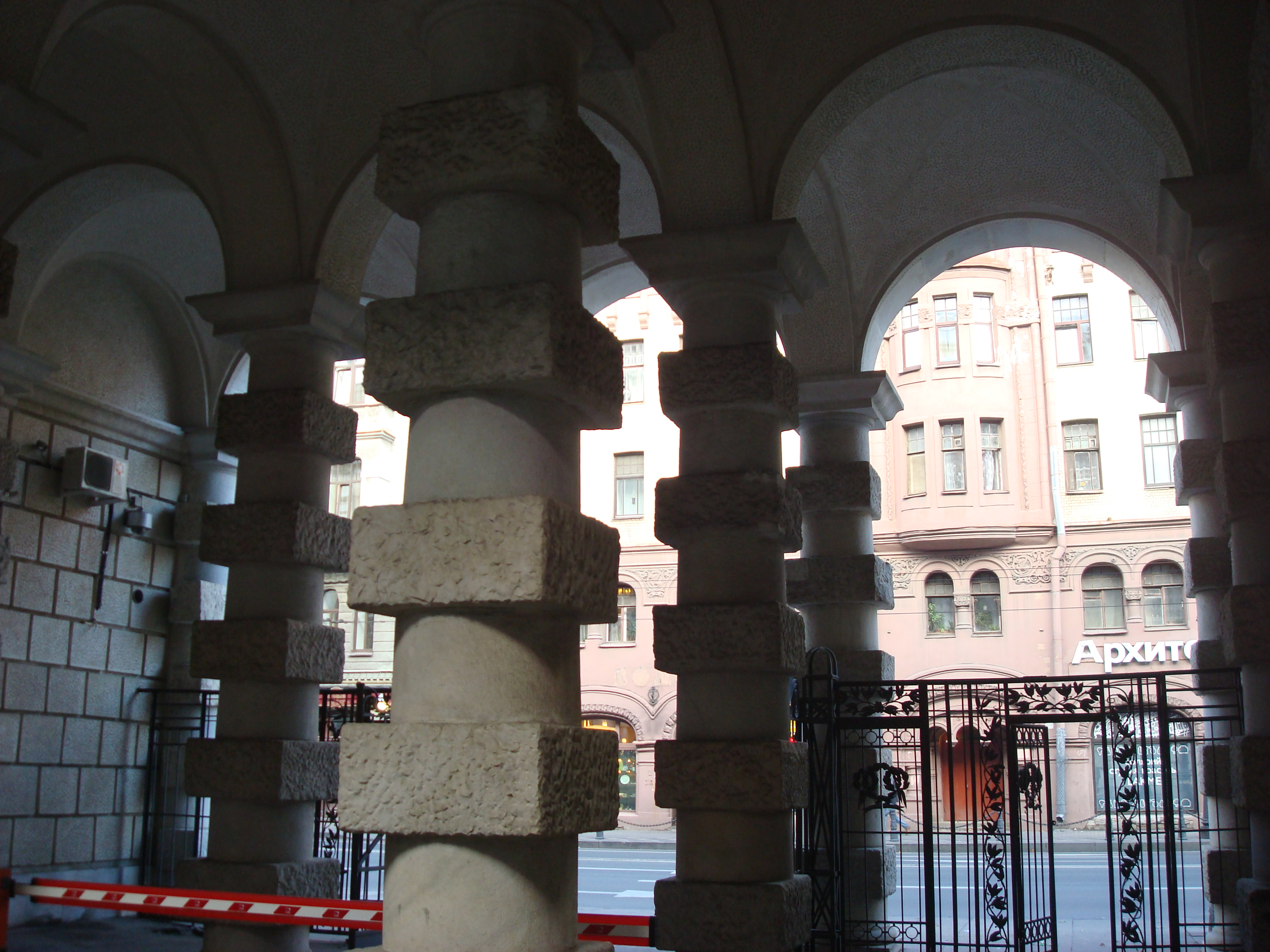 Дом эмира бухарского (Санкт-Петербург и Лен.область, Санкт-Петербург, каменноостровский пр., 44-б)